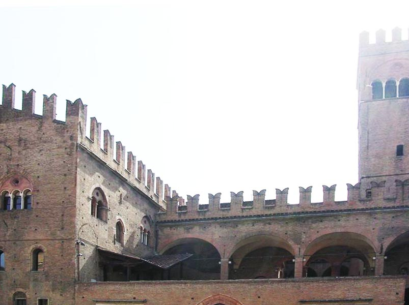 Palazzo di re Enzo a Bologna, con la Torre dell'Arrengo. Picture by Paolo Carboni (myself).